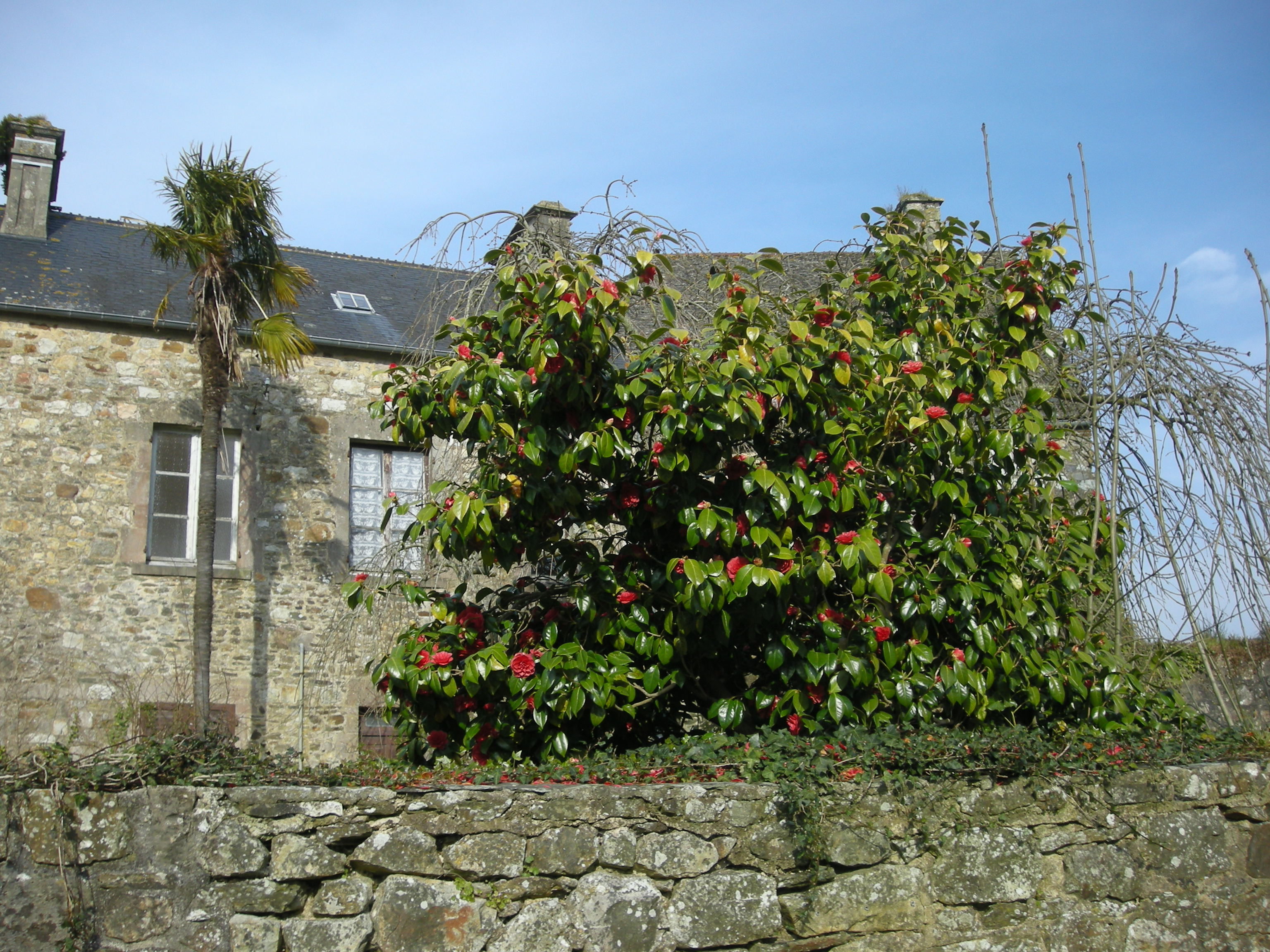 Palmiers et camélias à Bricquebec (Manche, Normandie, France)